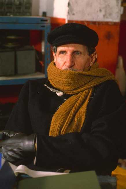 ciccio